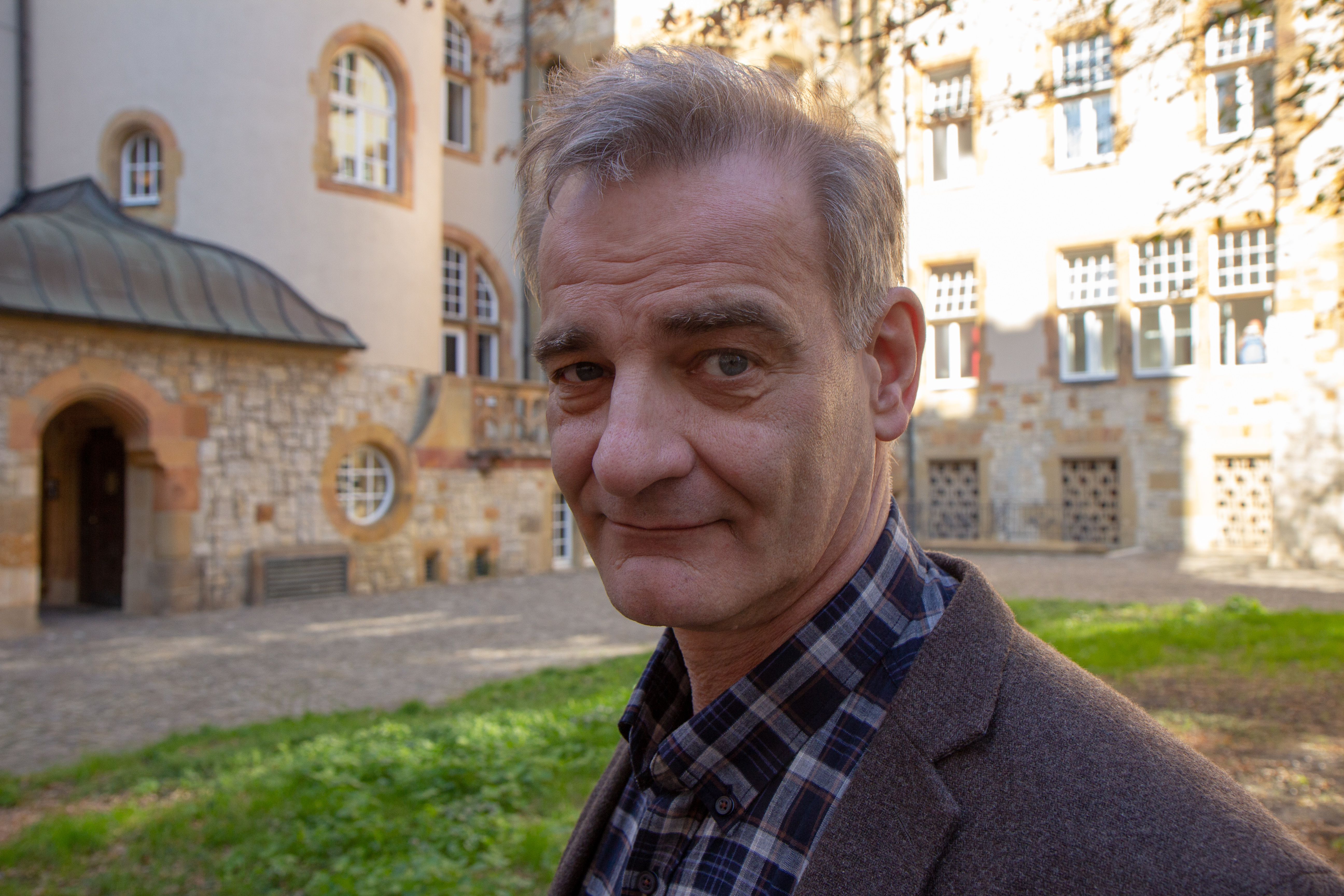 Pressetermin am Set "Wilsberg" am Alten Rathaus in Bielefeld am 15. Oktober 2018. Schauspieler: Heinrich Schafmeister